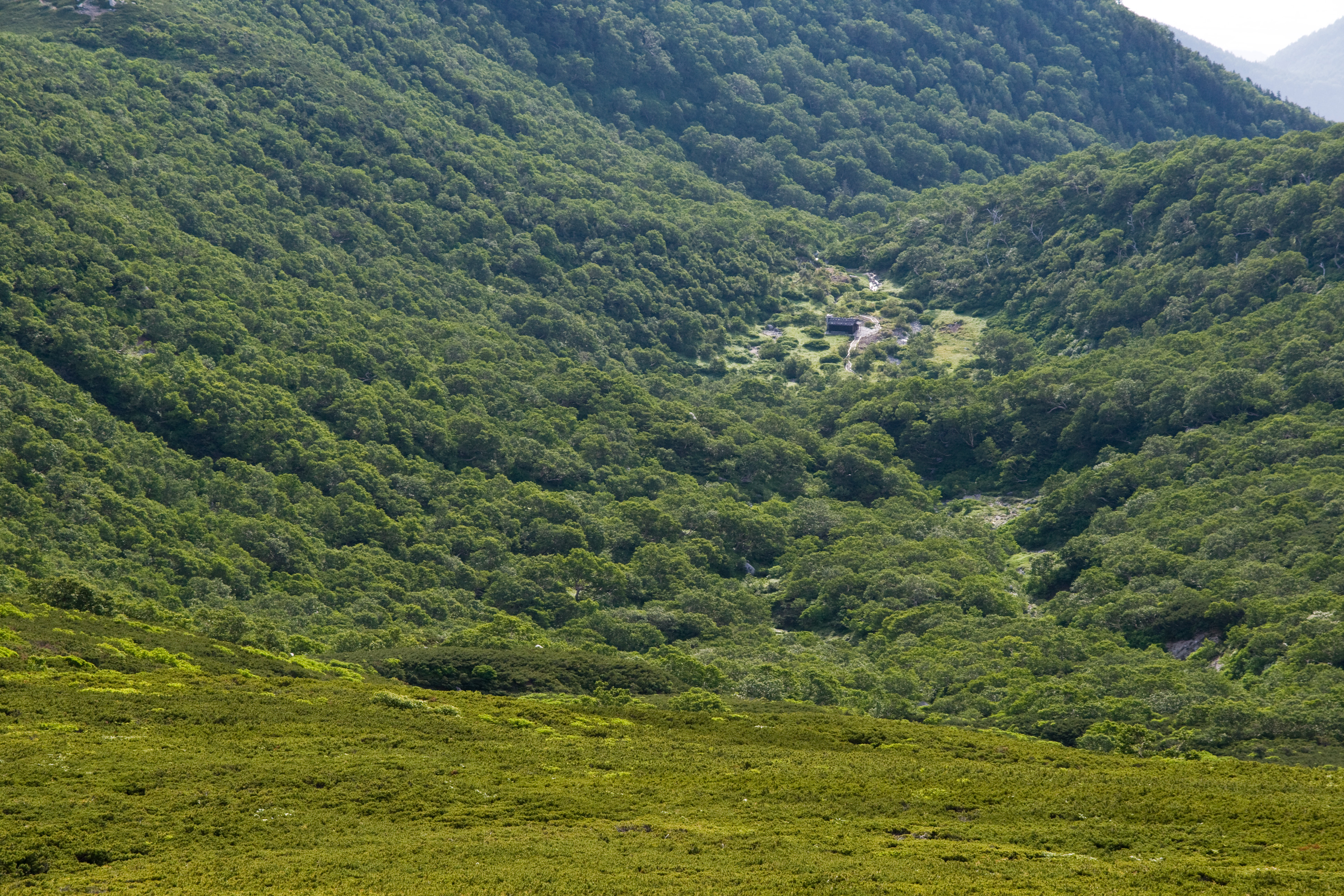 空木岳山頂より見た空木平カール